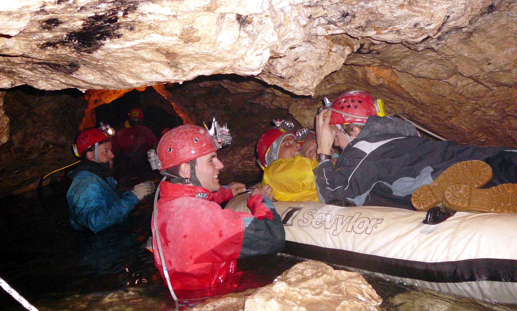 L'ingresso della grotta Calgeron con l'ausilio di un canotto